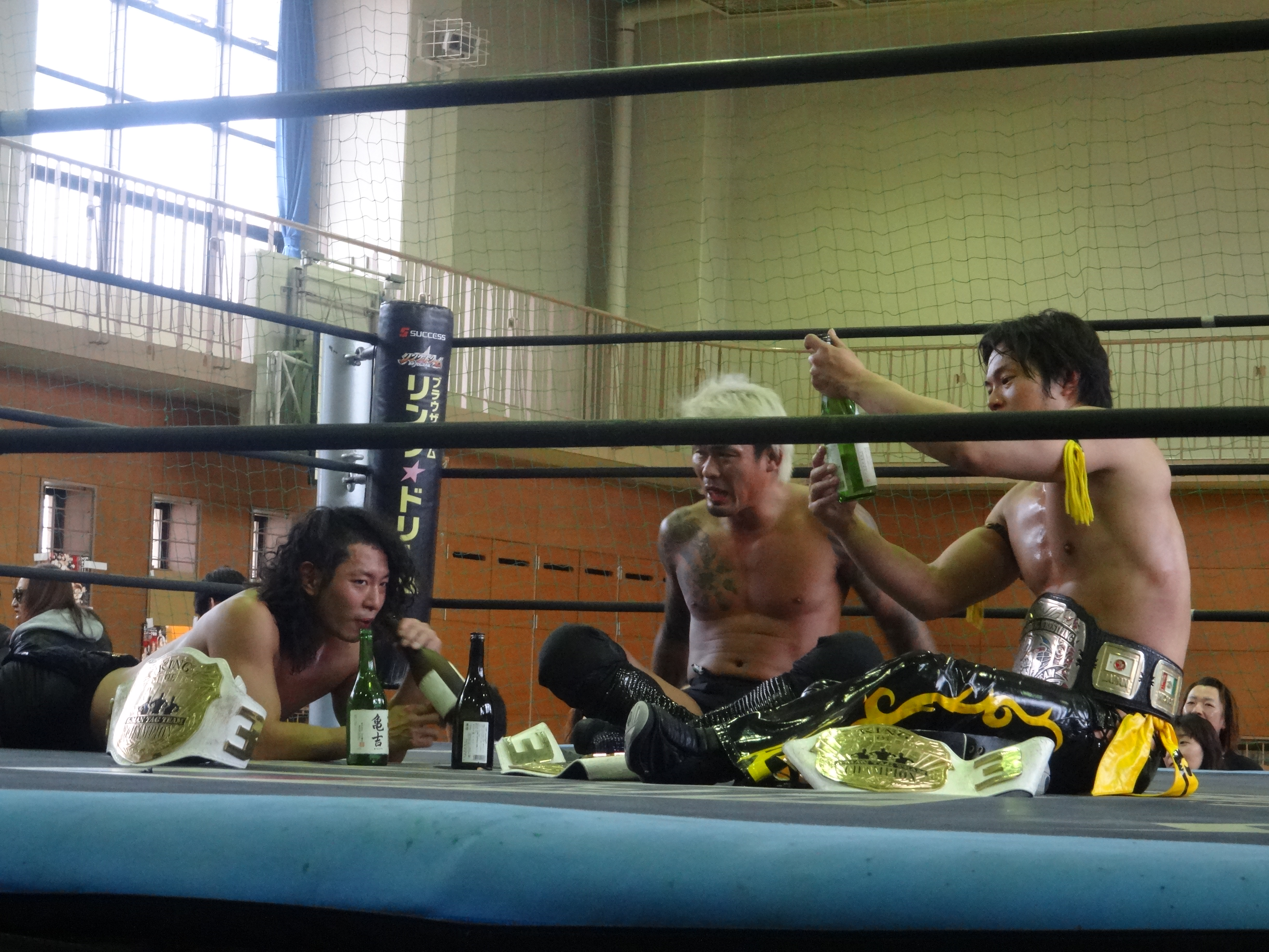 5.5青森大会より